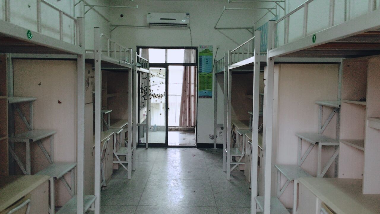 福州第八中学三江口校区宿舍室内陈设。